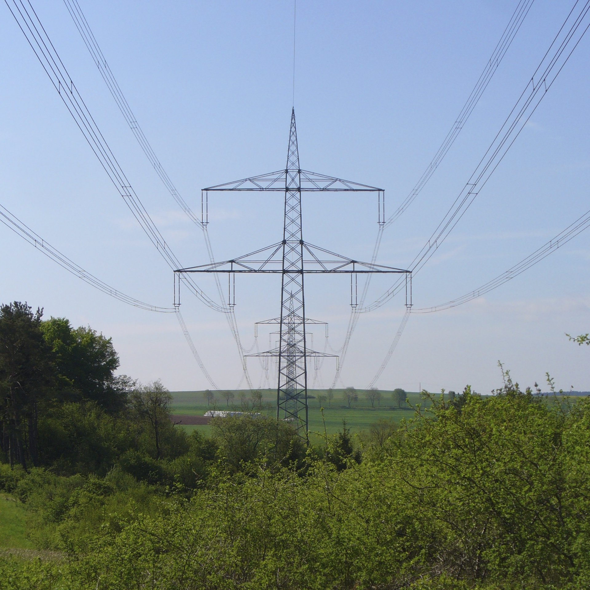 Tragmastreihe der 380-kV-Freileitung Oberzier–Niederstedem (Bl. 4527) bei Nettersheim in der Nordeifel, Nordrhein-Westfalen; Blick nach Süden